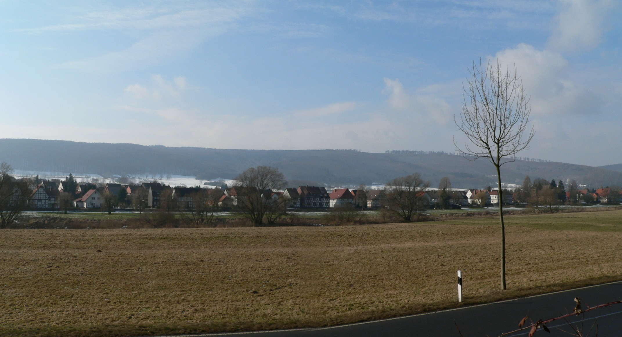 Reinhardshagen, Ortsteil Vaake Quelle: selbst fotografiert Fotograf: presse03 11:24, 20. Feb 2006 (CET) Datum: Februar 2006